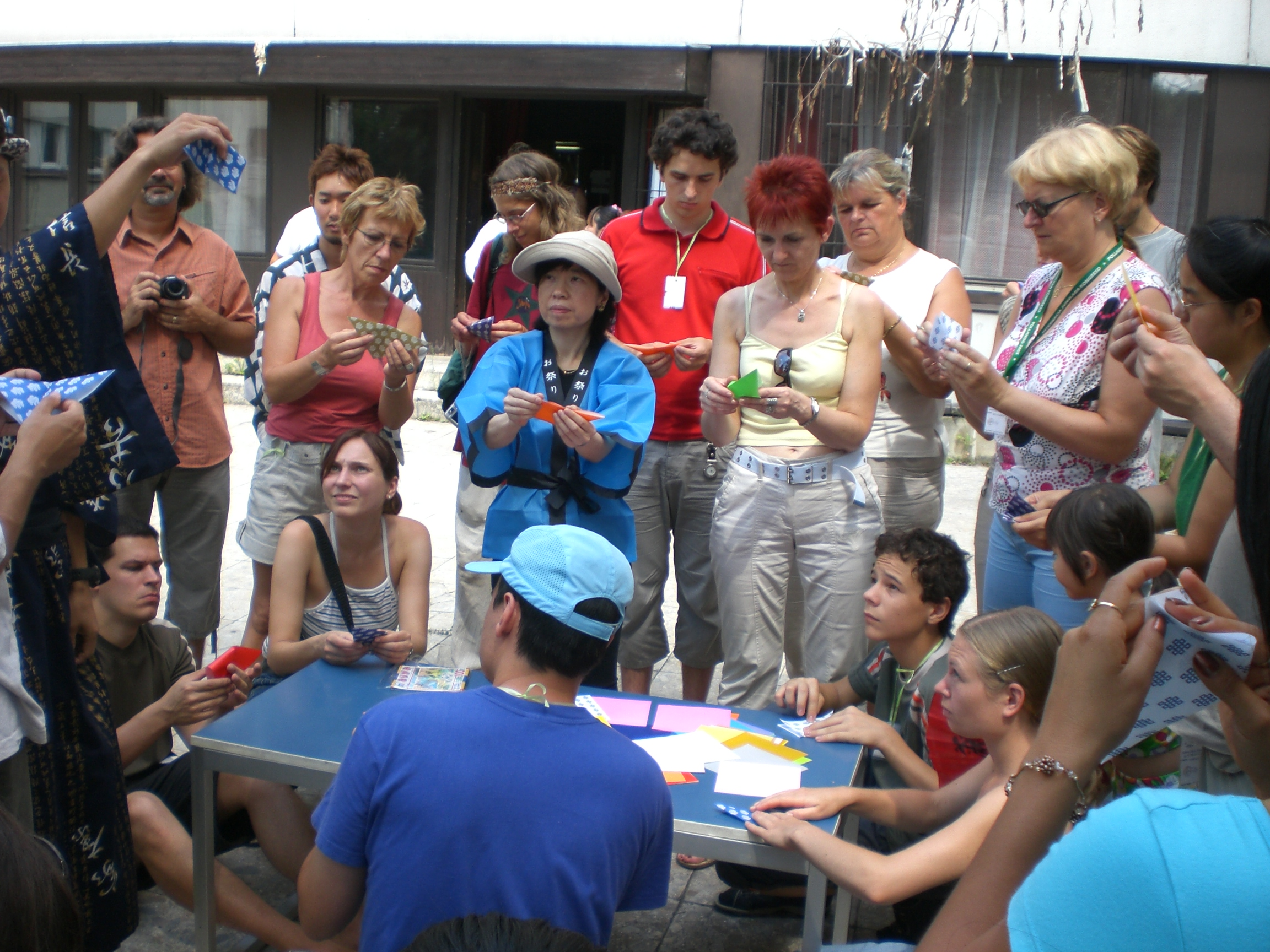 Anoj de la IJK 2008 dum kurso pri origamo